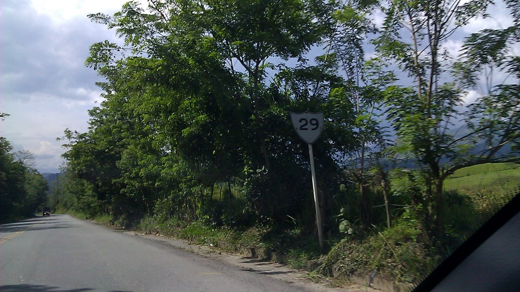 Colombia: Ruta Nacional 29